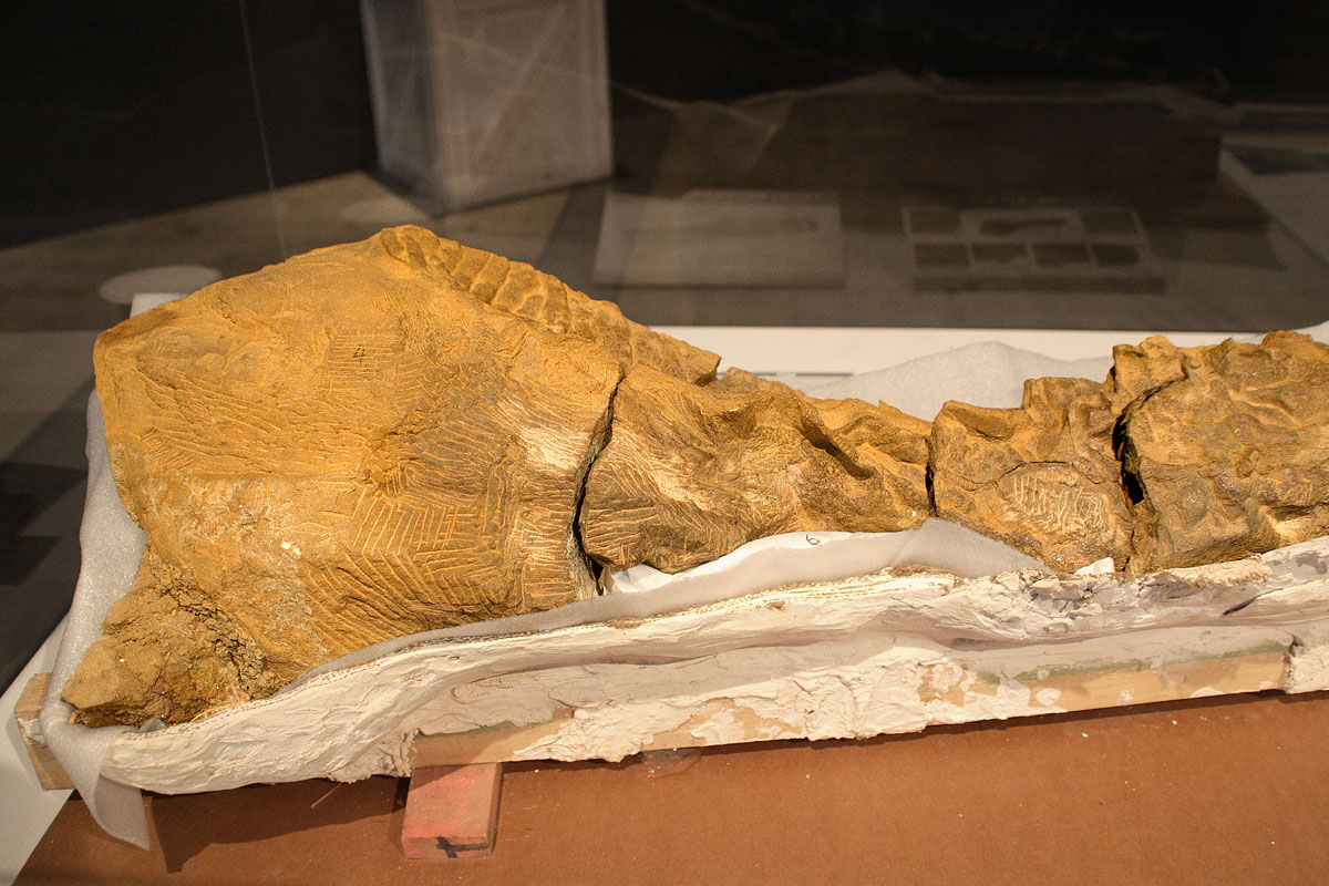 Edmontosaurus annectens ("Dakota") - 01